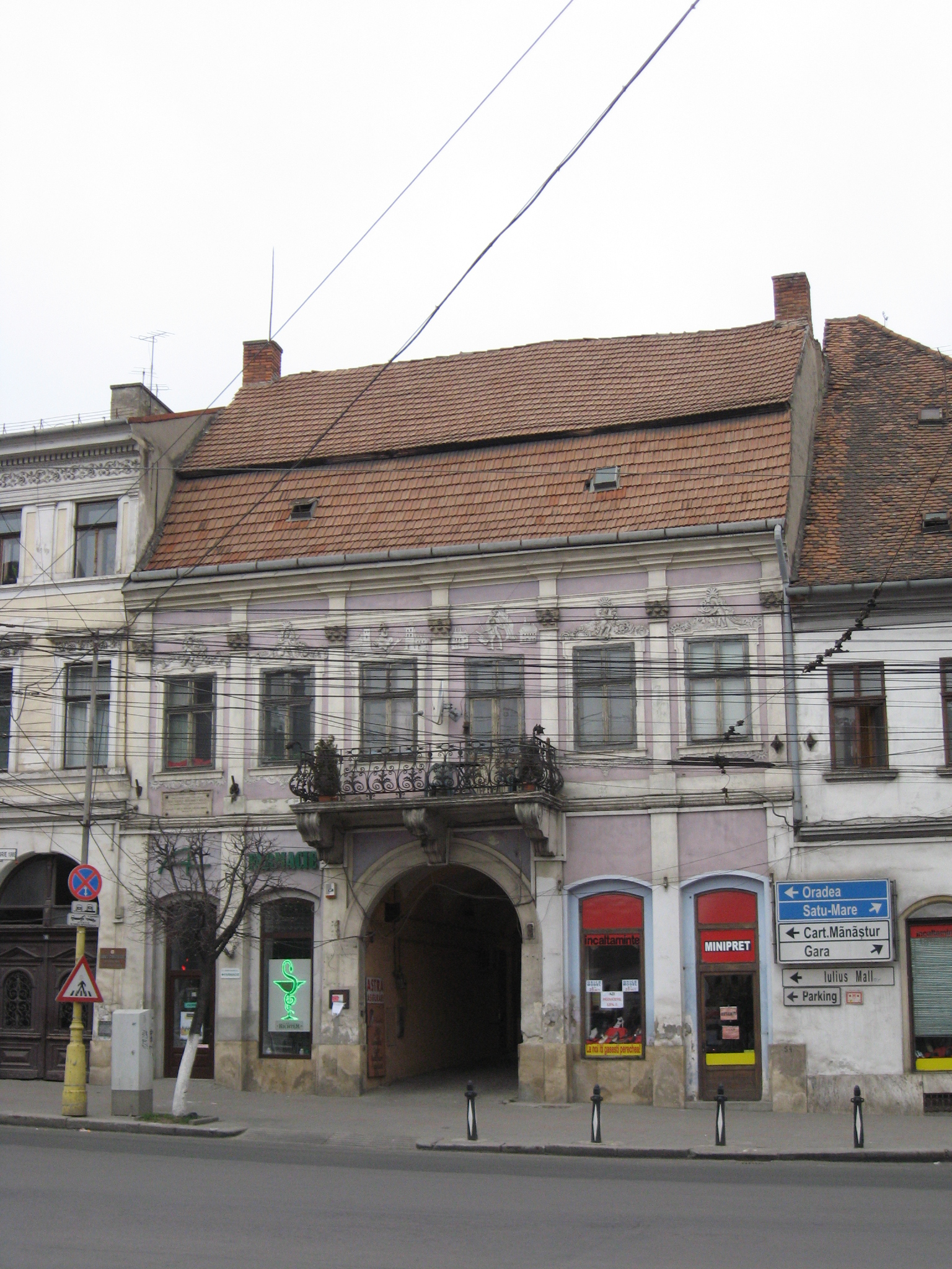 Cluj-Napoca, Casa Filstich-Kemény (Piaţa Unirii nr.27)